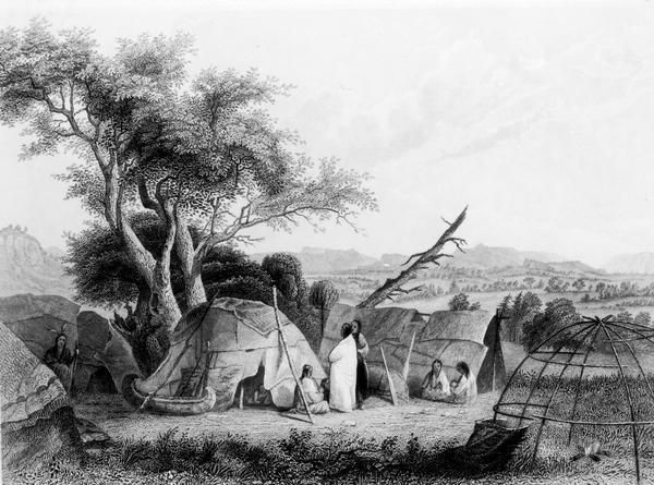 Winnebago family